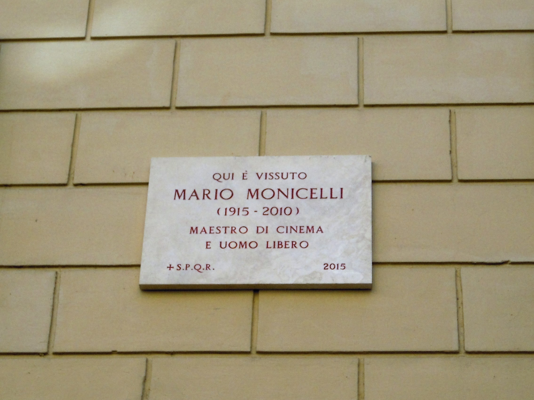 Lapide commemorativa di Mario Monicelli in via dei Serpenti 29 - Roma, rione Monti